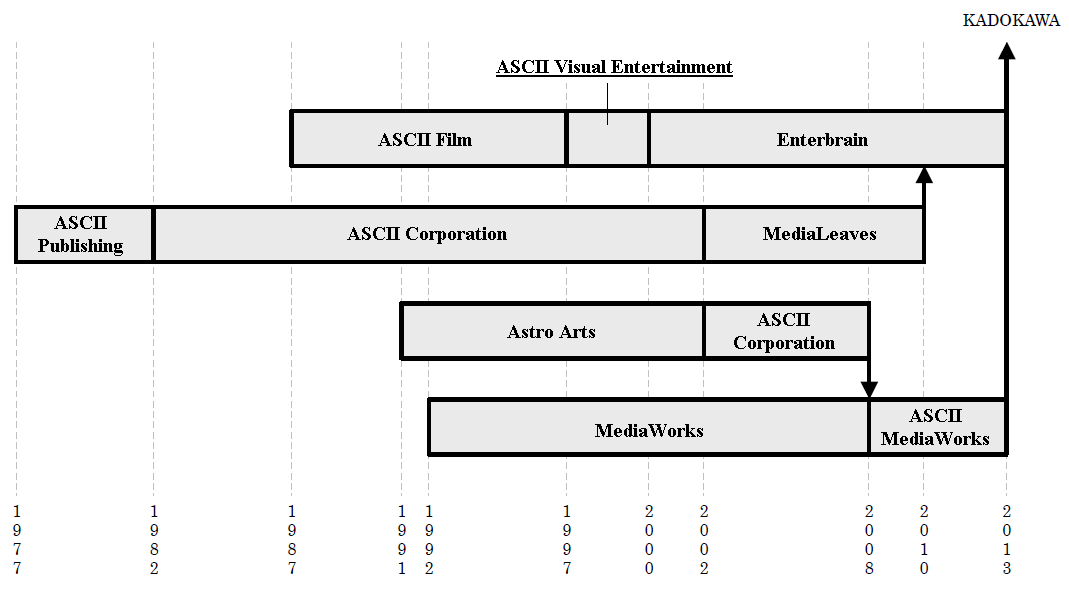 Frise chronologique du début des entreprises ASCII, MediaWorks, ASCII Media Works et Enterbrain à 2013.